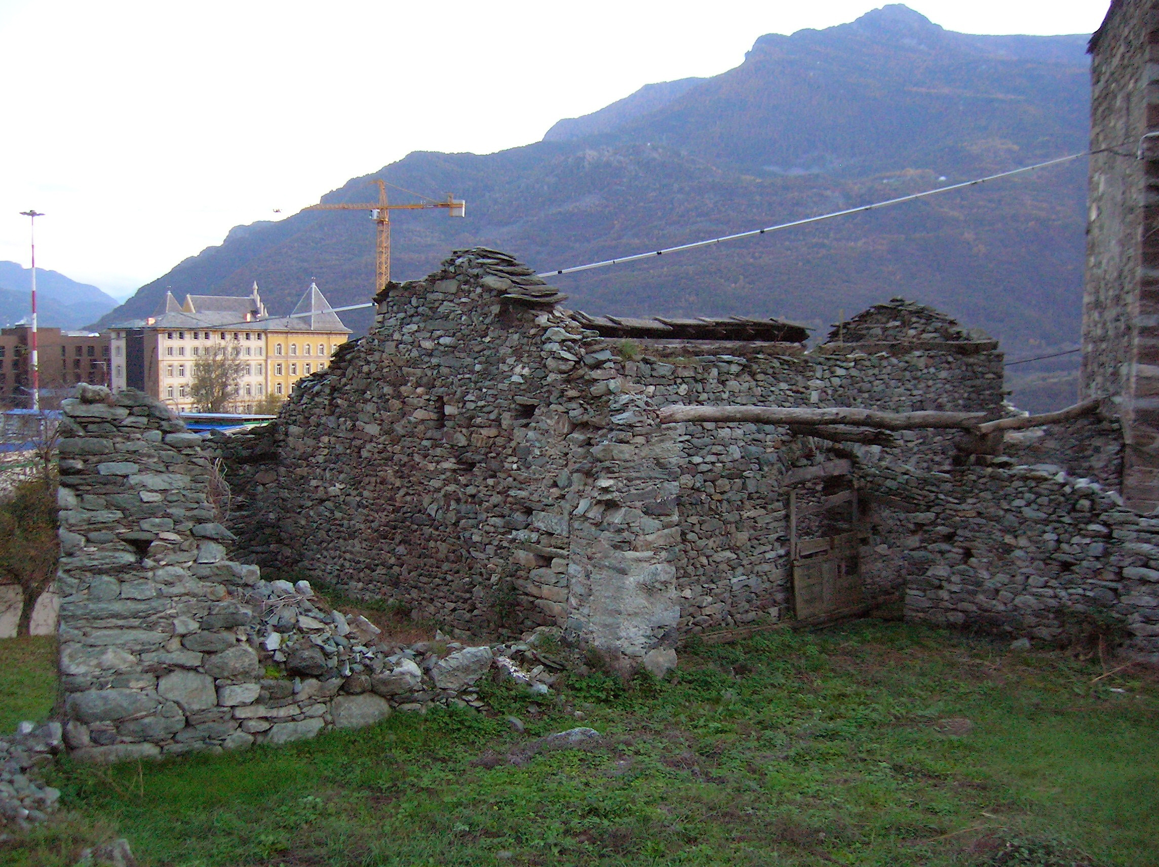 Torre di Néran durante il restauro, Châtillon, Valle d'Aosta, Italia.